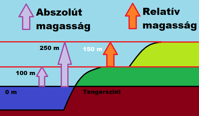 A relatív és abszolút magasság közötti különbség egyszerű szemléltetése.